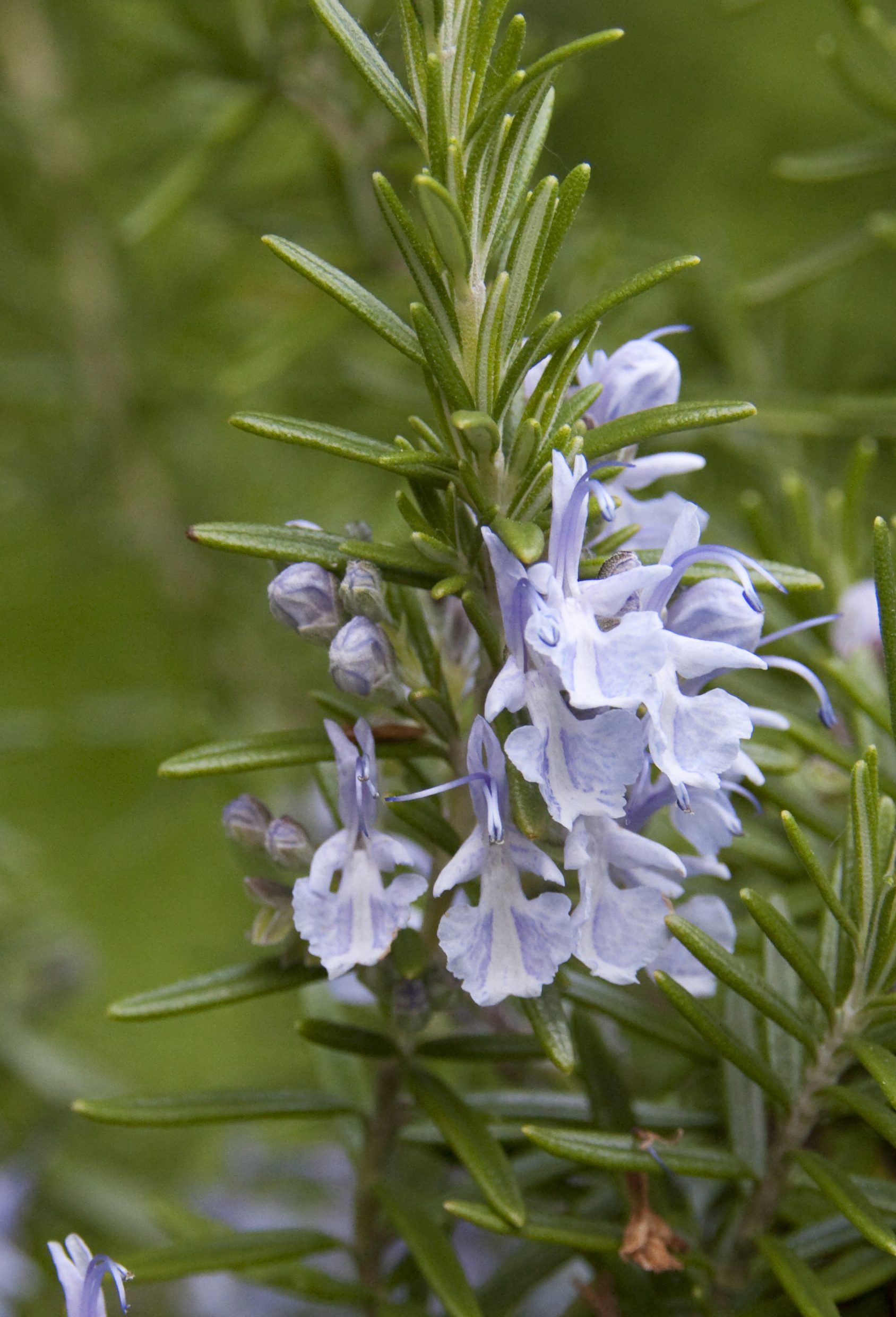 blue10